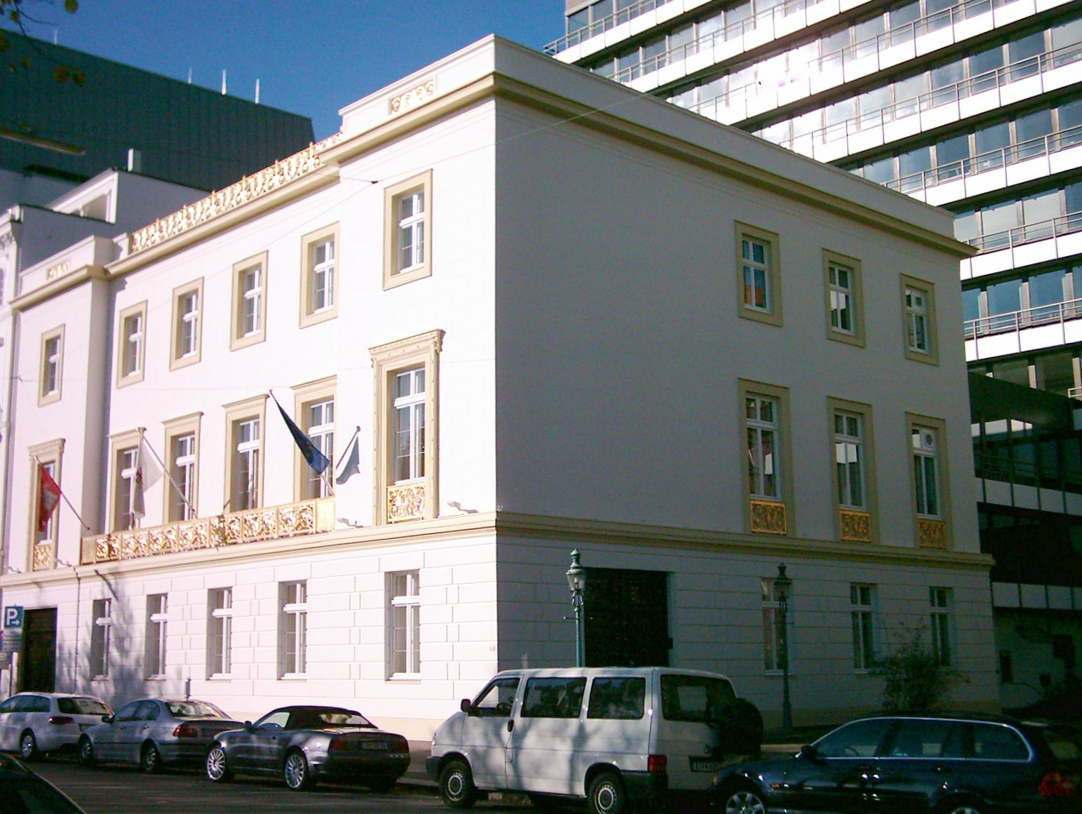 Patrizierhaus am Neuen Jungfernstieg 19 in Hamburg-Neustadt. 1831 - 33 von Franz Gustav Joachim Forsmannfür den Hamburger Bankier Gottlieb Jenisch erbaut, restauriert 1967 - 1970.